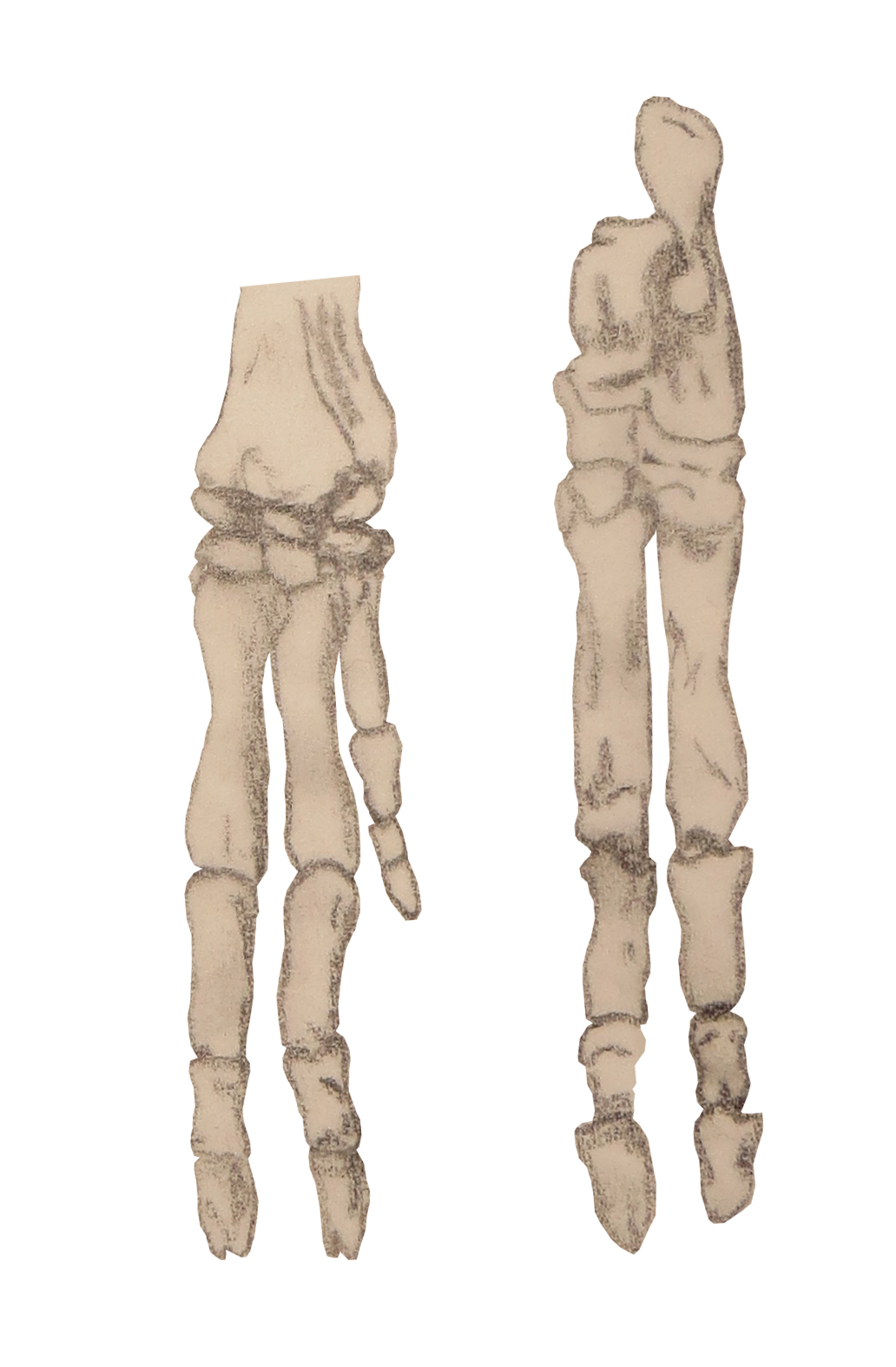 Manus and pes of Miocochilius